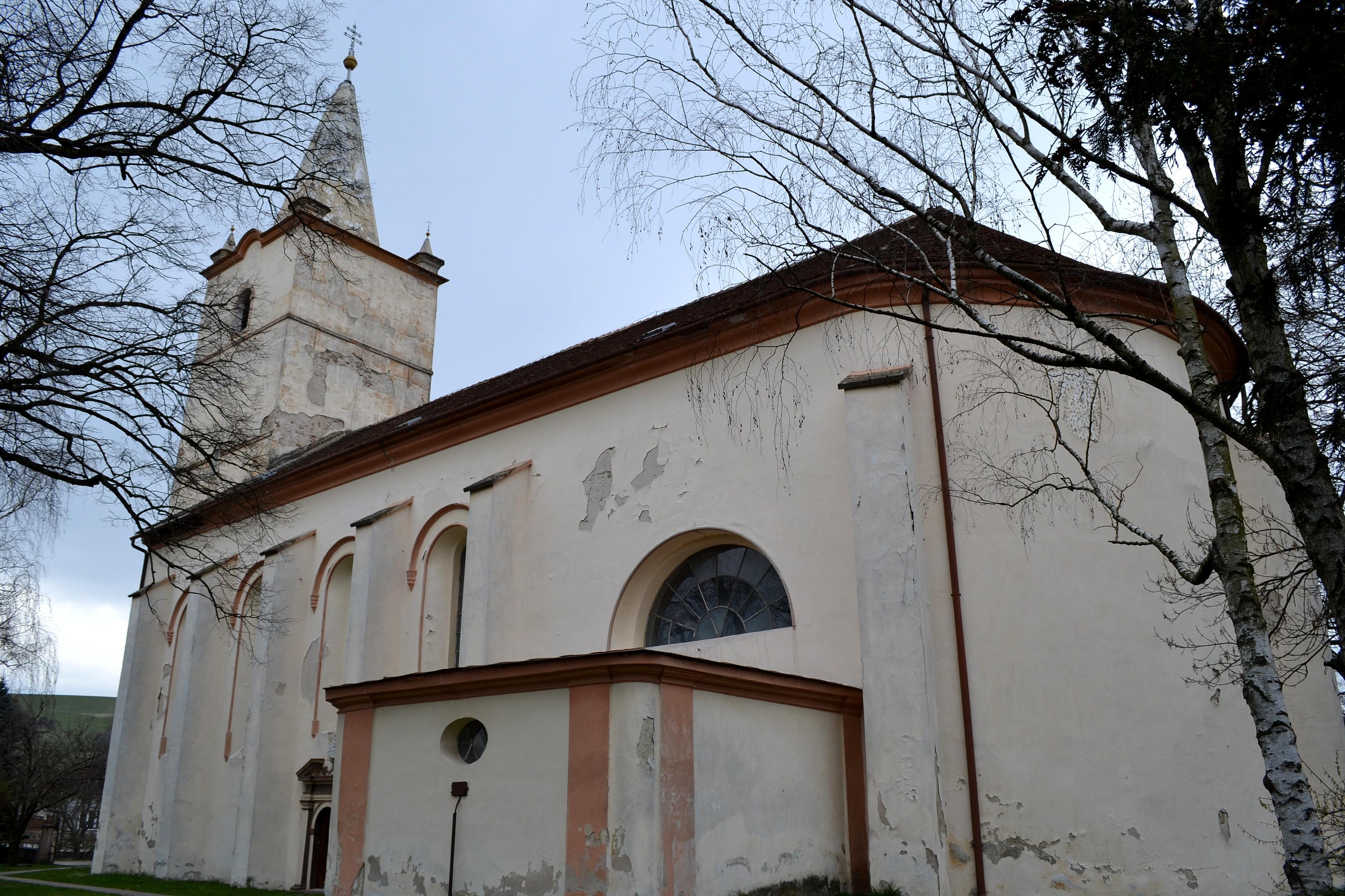 Sobotište (okr. Senica), Kostol Nanebovzatia Panny Márie; celkový pohľad